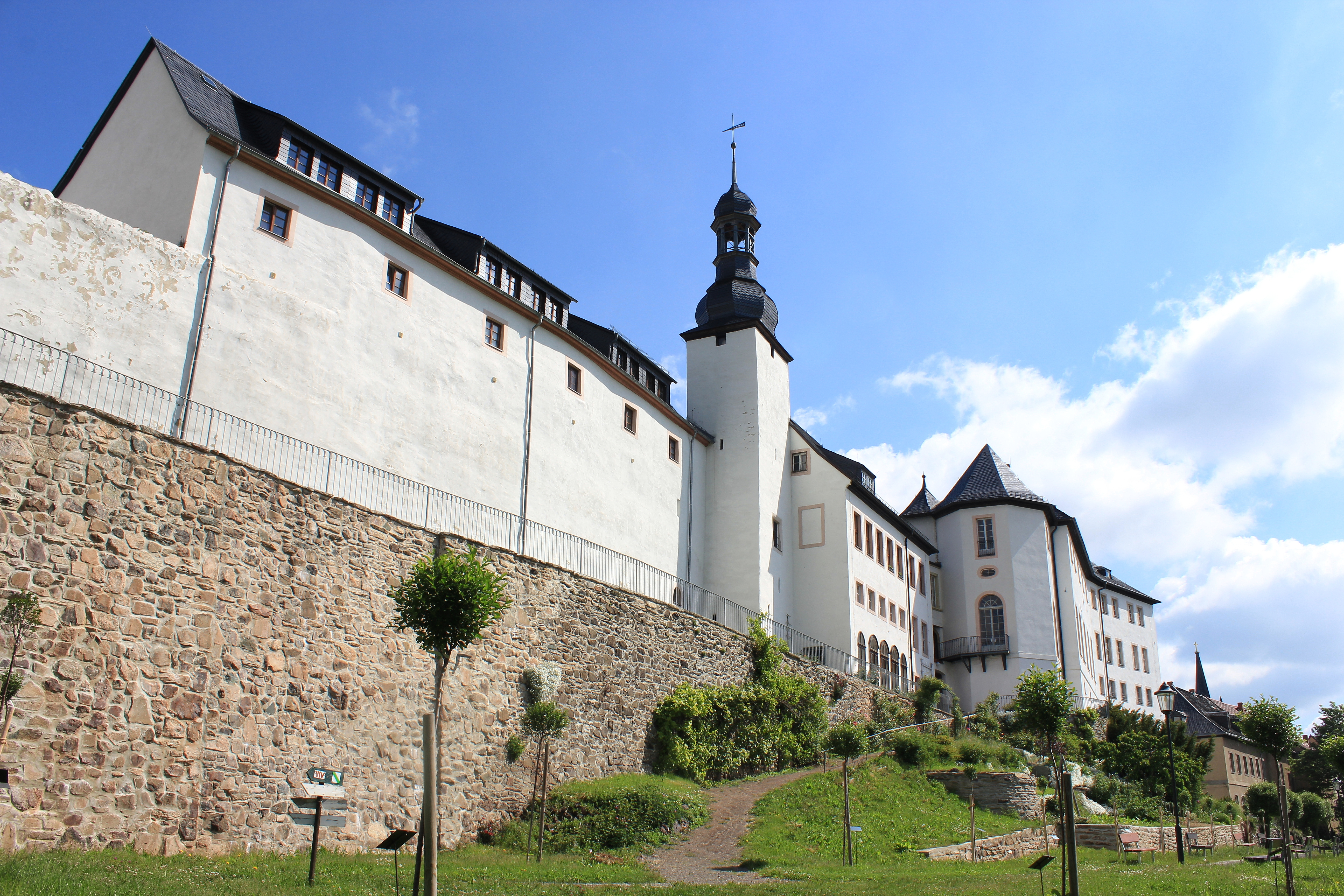 In Wildenfels. Sachsen.